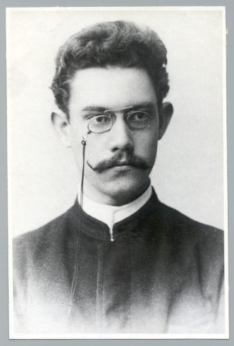 Richard Aavakivi